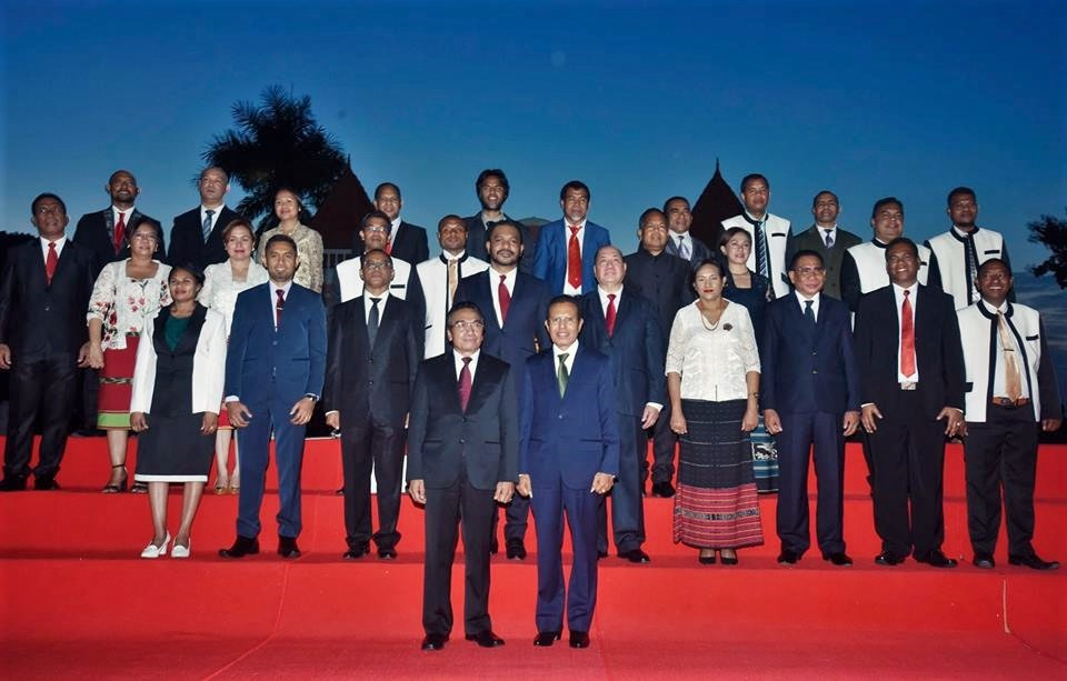 Gruppenbild der VIII. konstitutionellen Regierung Osttimors